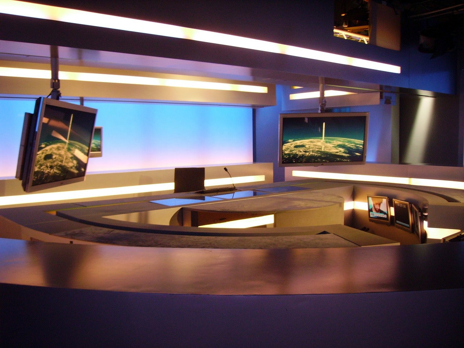 Plateaux du JT de France 3 National.